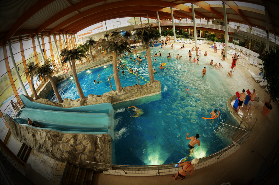 Wrocławski Park Wodny - Baseny Rekreacyjne, basen z falą